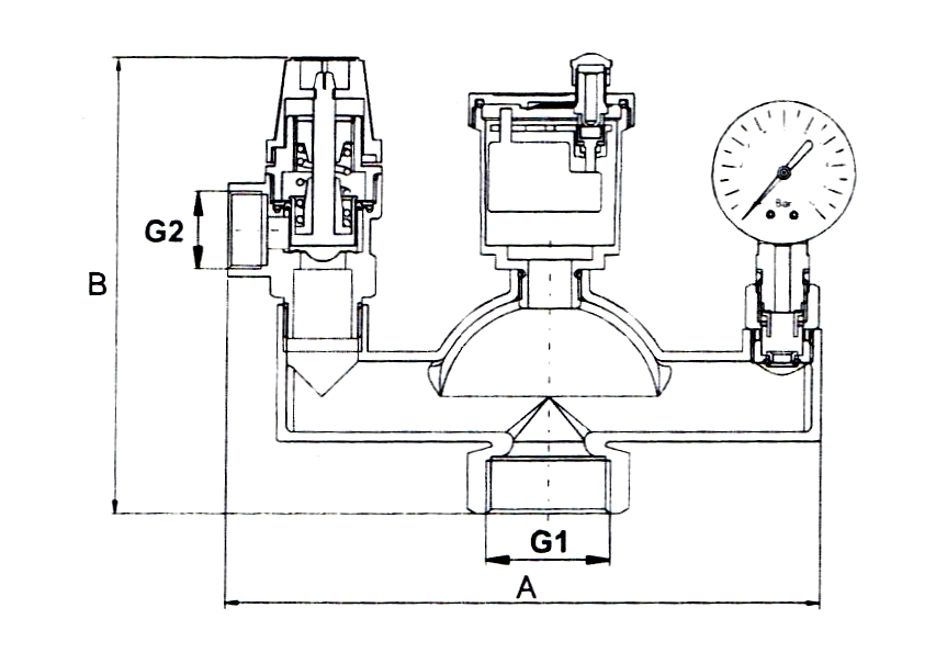 Строение группы безопасности для котла